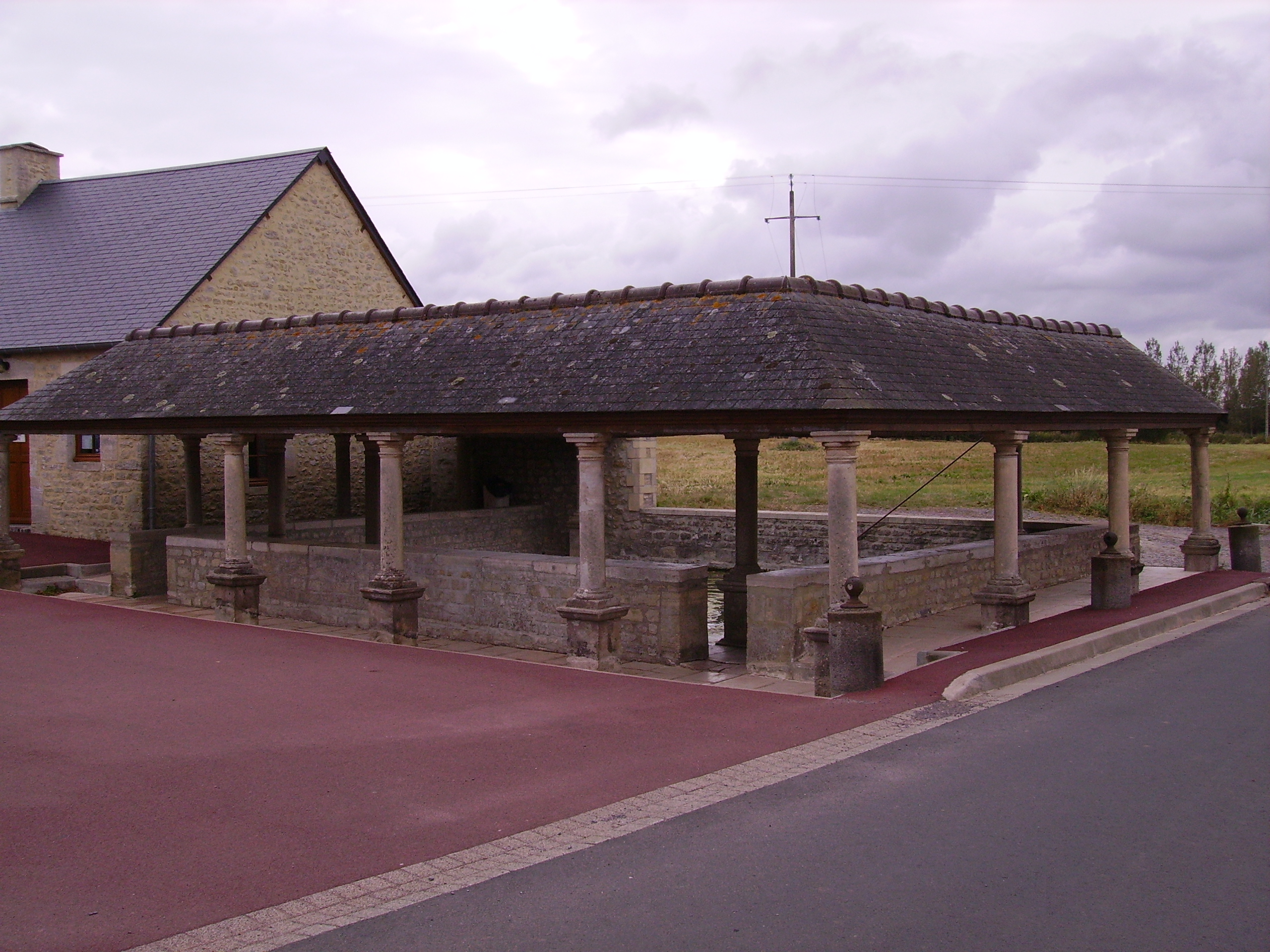 Ecrameville Le Lavoir couvert